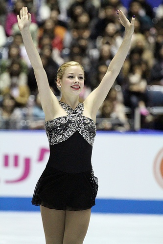 Грейси Голд (США) на командном чемпионате мира по фигурному катанию 2012